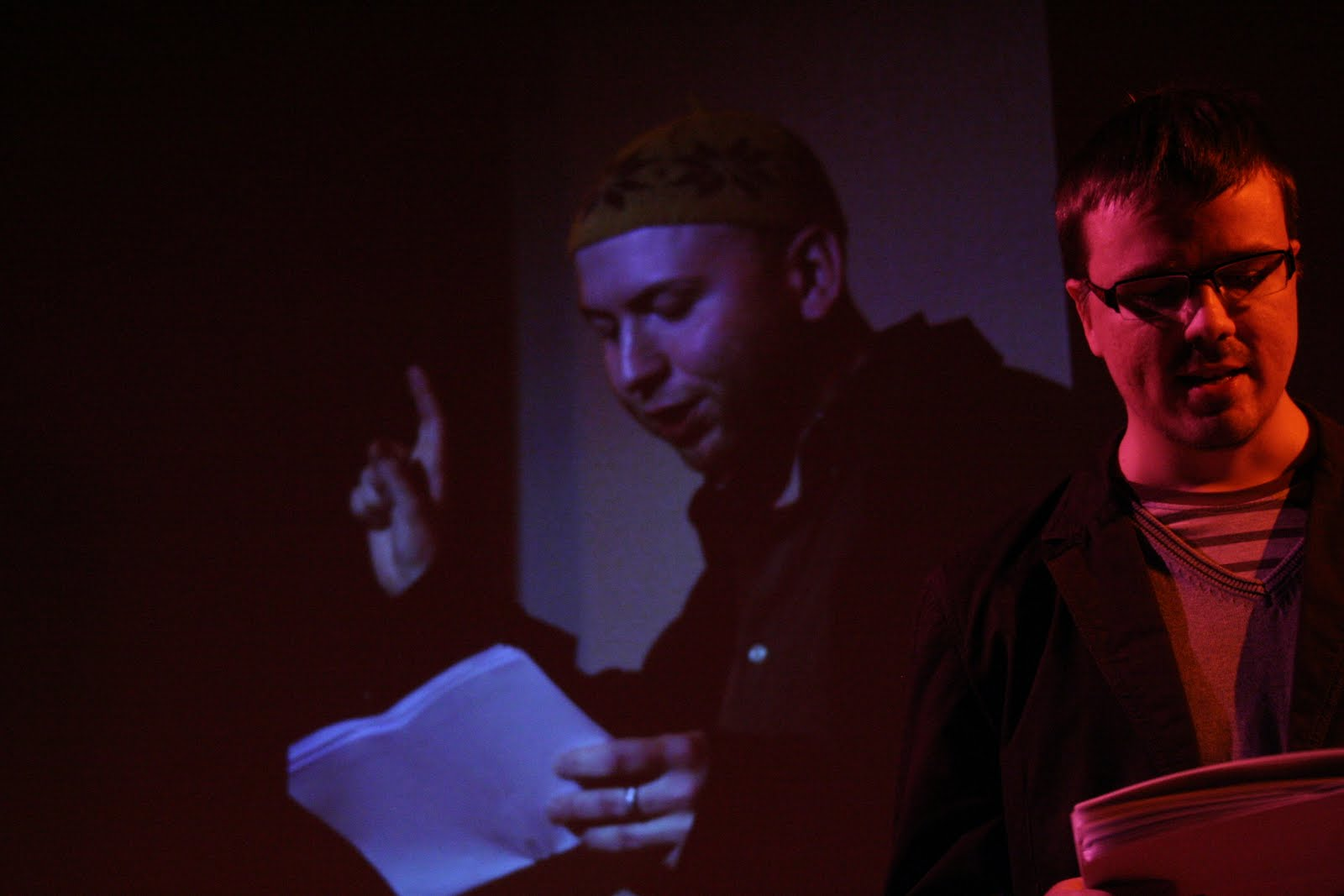 Rolf Liiv (taustal Jürgen Rooste) TNT kokkutulekul 17. märtsil 2010 Kirjanike Majas.